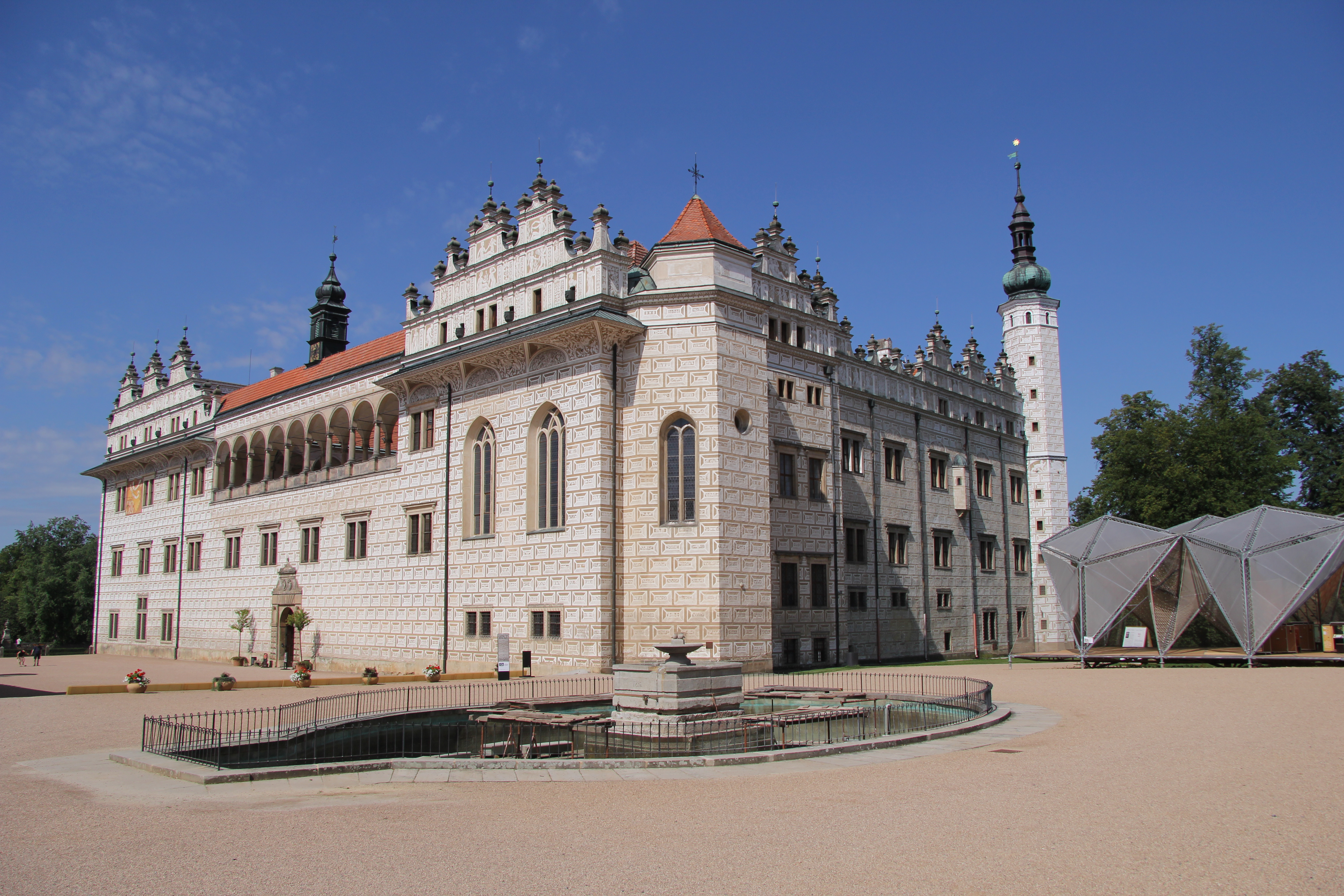 Státní zámek v Litomyšli (2017)